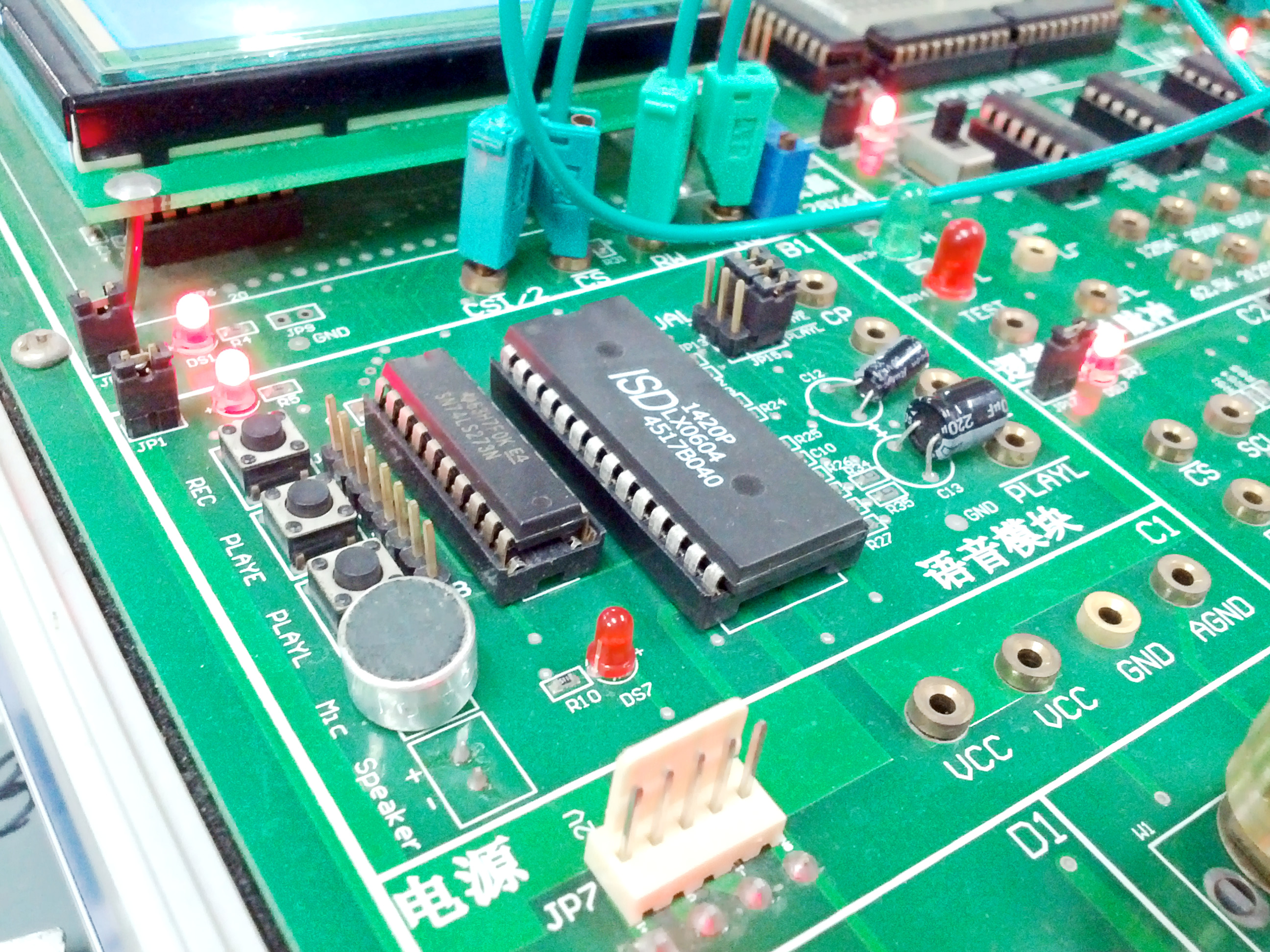 中文（中国大陆）: 为单片机实验服务的语音模块